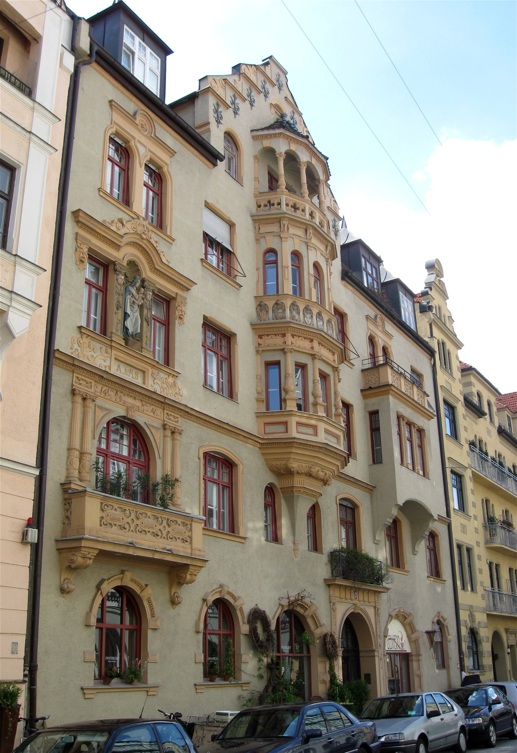 Liebherrstraße 8; Mietshaus, deutsche Renaissance, malerische, kräftig gegliederte Front mit Erkern und reichem plastischem Dekor, um 1904 von August Spies und Adolf Wentzel.